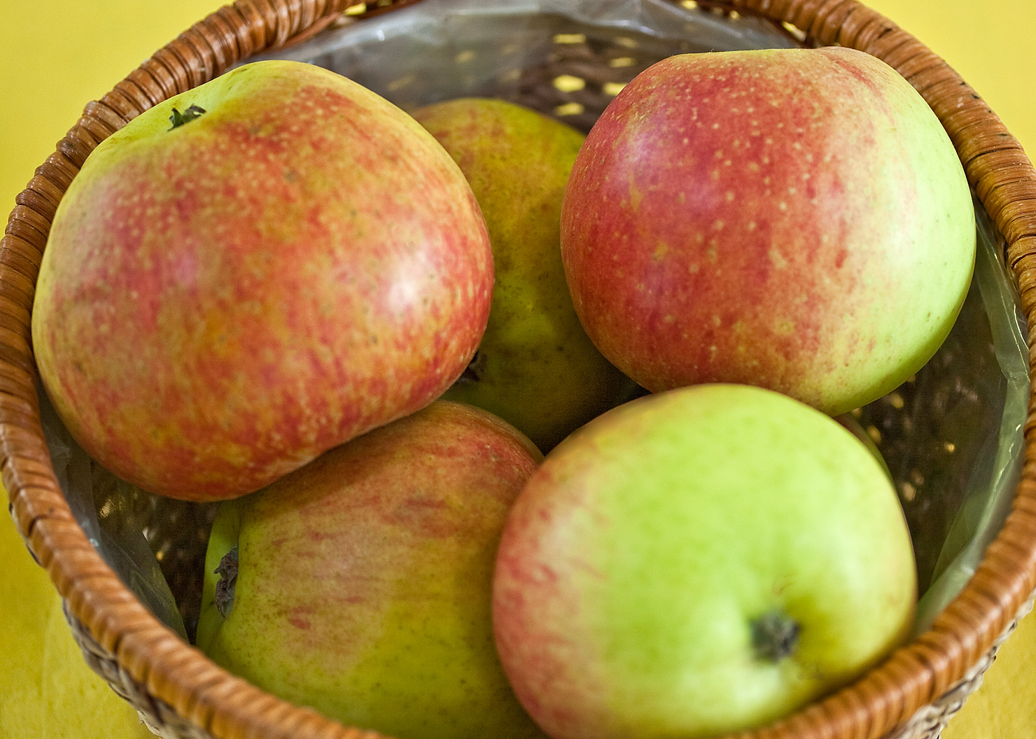 Die Harberts Renette ist eine Apfelsorte